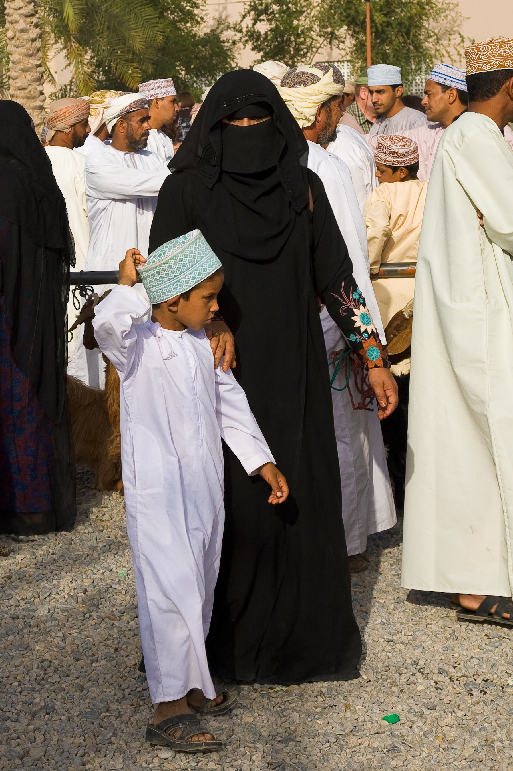 Nizwa goat market